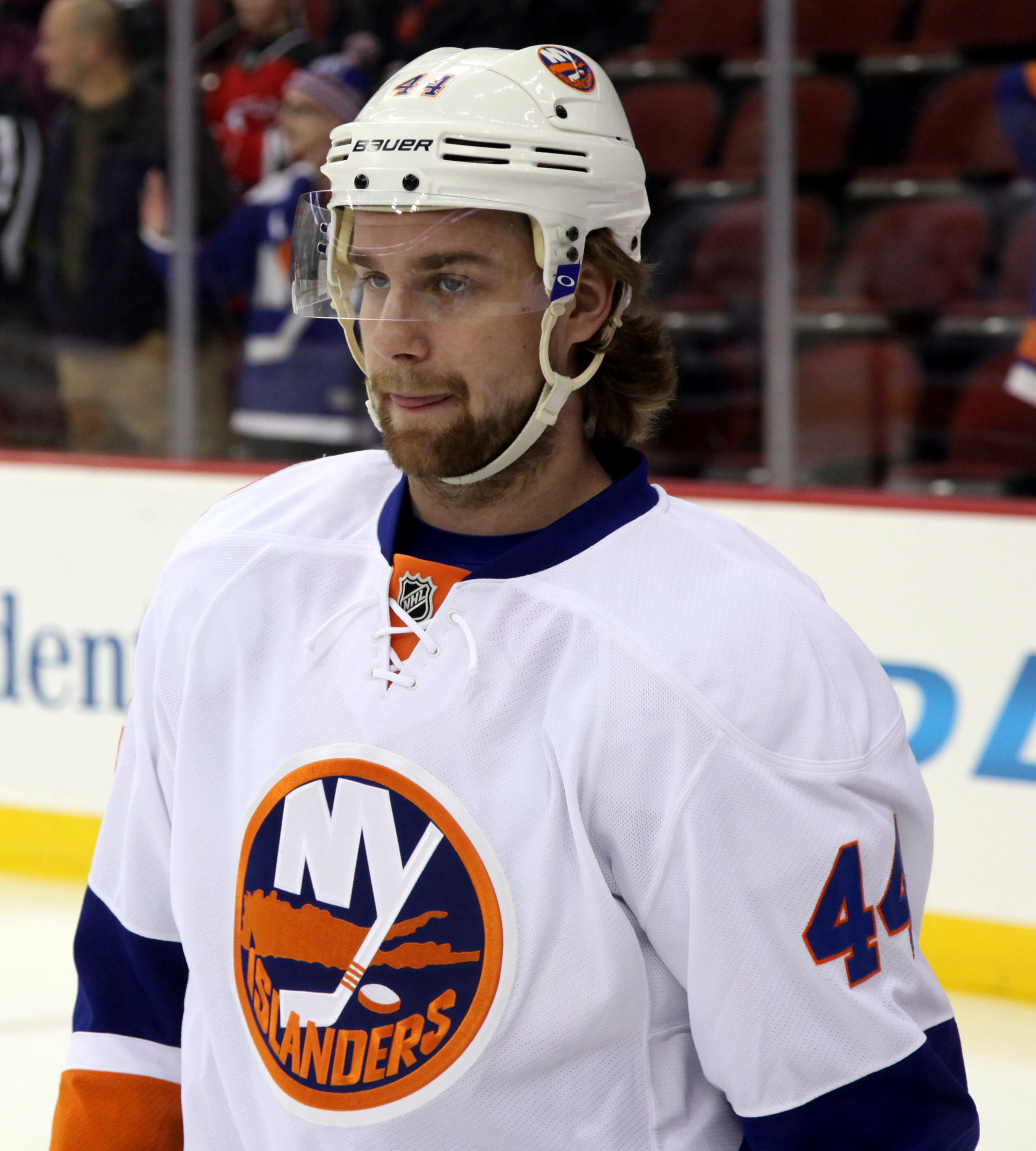 Calvin de Haan in January 2015.